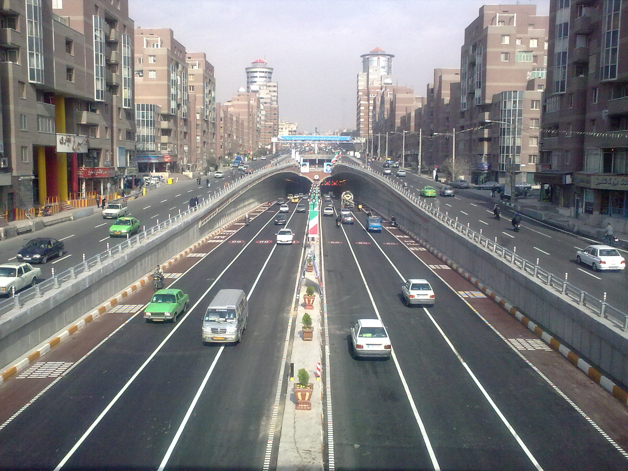 Tohid Tunnel+ورودی تونل توحید